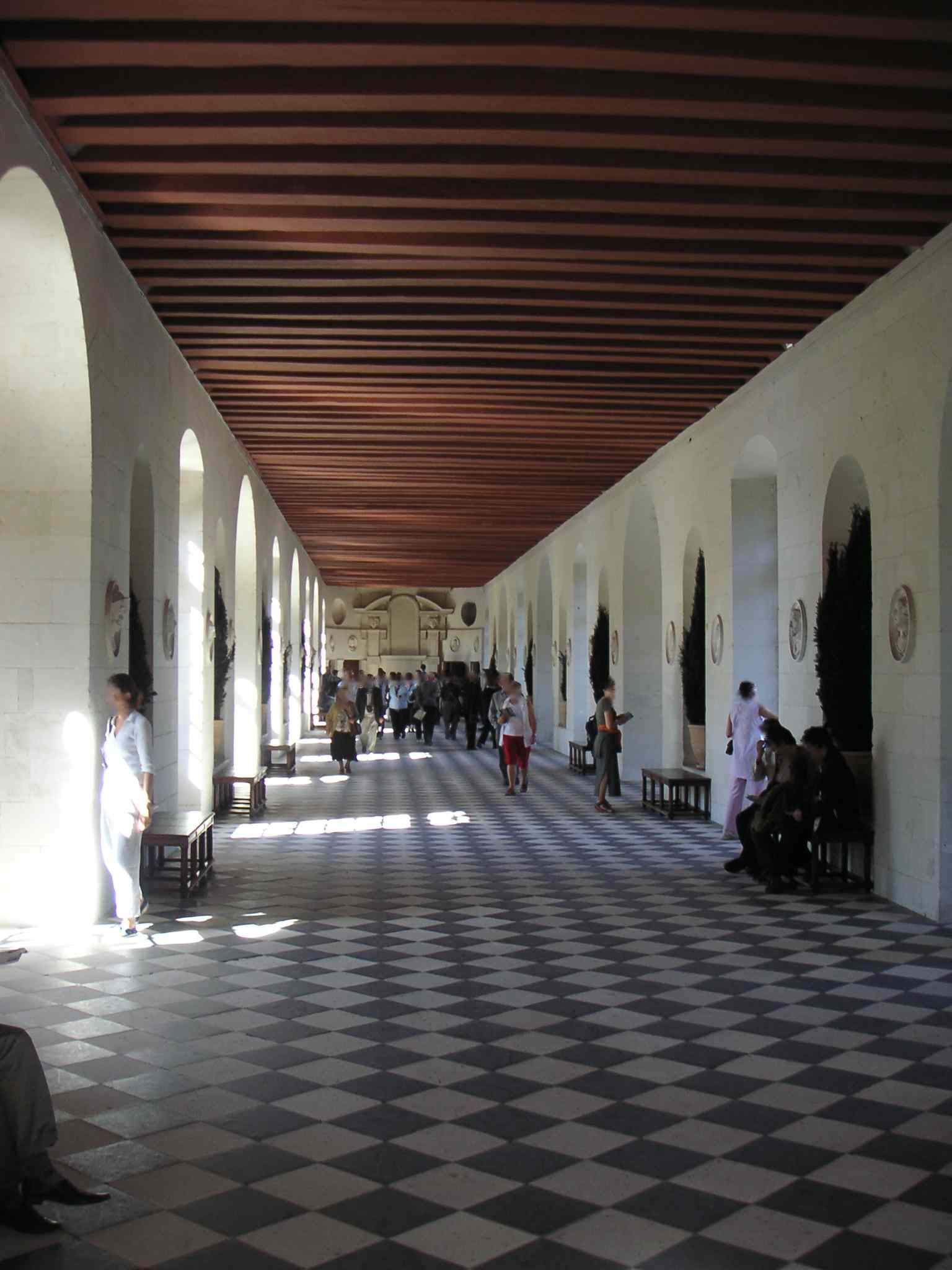 Galerie du Rez-de-chaussé le château de chenonceau (France)